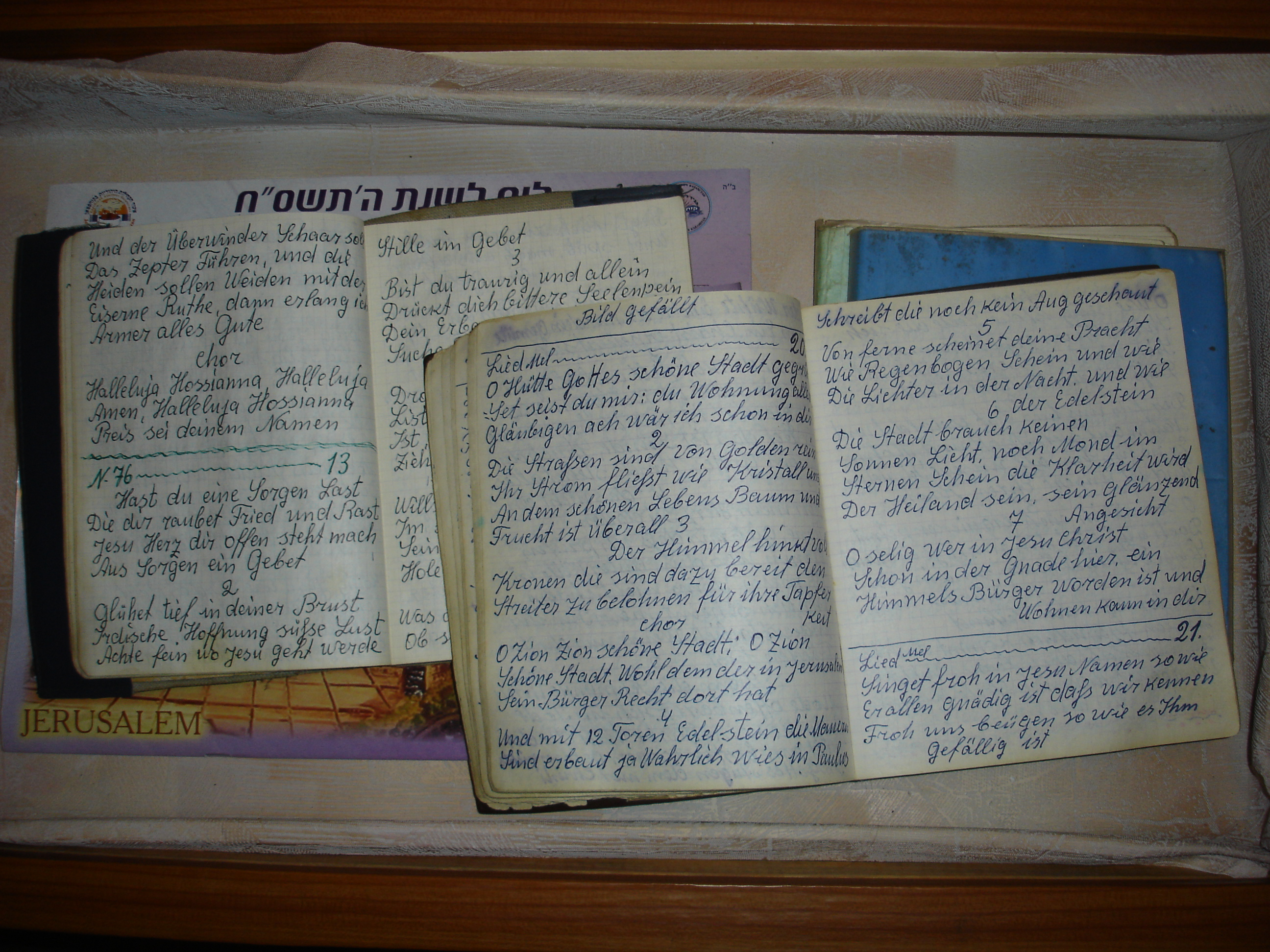 Римско-католическая церковь Святой Терезы Младенца Иисуса, Павлодар. Казахстан. Церковный музей, посвящённый истории христианской веры в Казахстане. Часть экспозиции - вручную переписанные старыми немками католические песенники